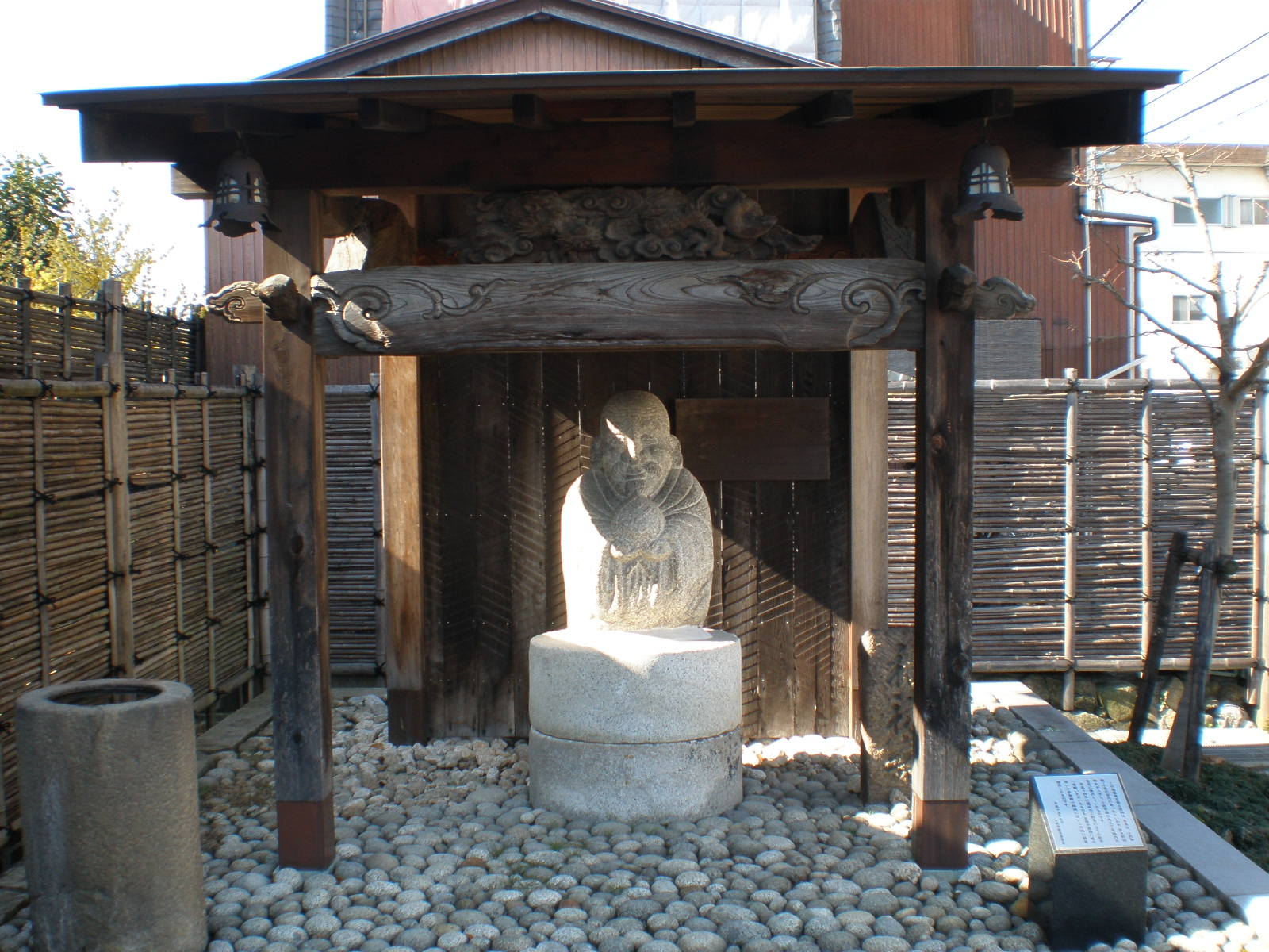 愛知県小牧市の小牧御殿・小牧代官所内にあったとされる福禄寿の石像